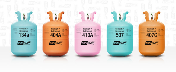 Хладагент «CoolCraft»